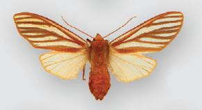 Pseudohemihyalea syracosia female